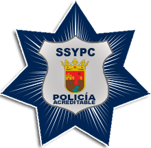 Escudo de la Policía Acreditable del Estado de Chiapas